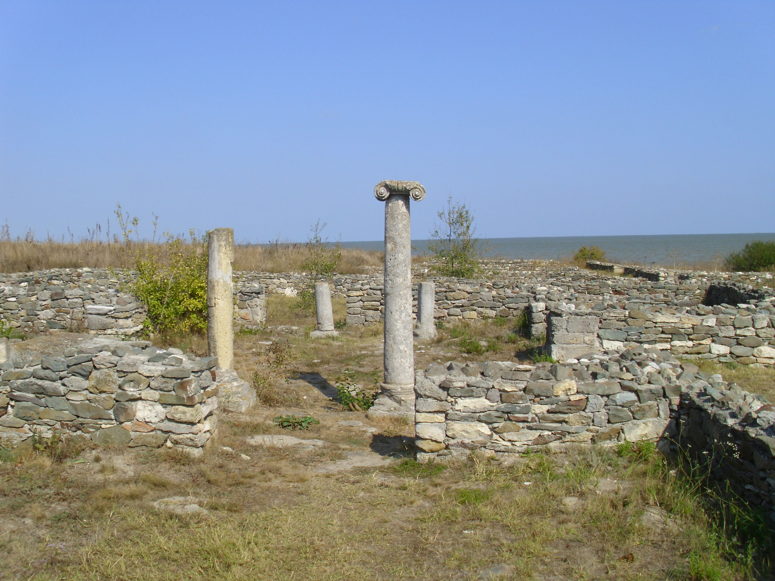 zona Domus 01